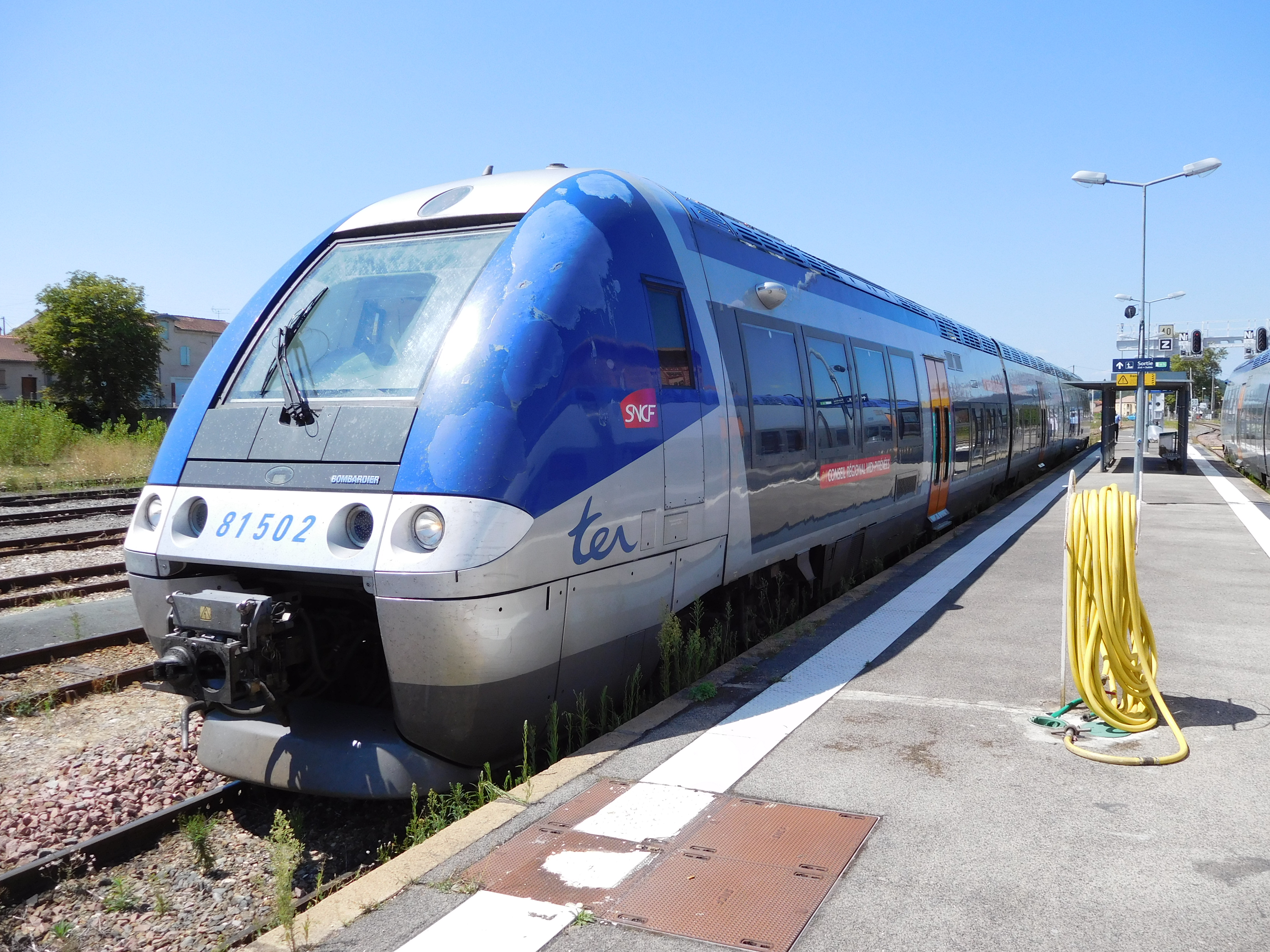 Un AGC Occitanie B81501/502 à l'arrêt en gare de Carmaux, Tarn, France.